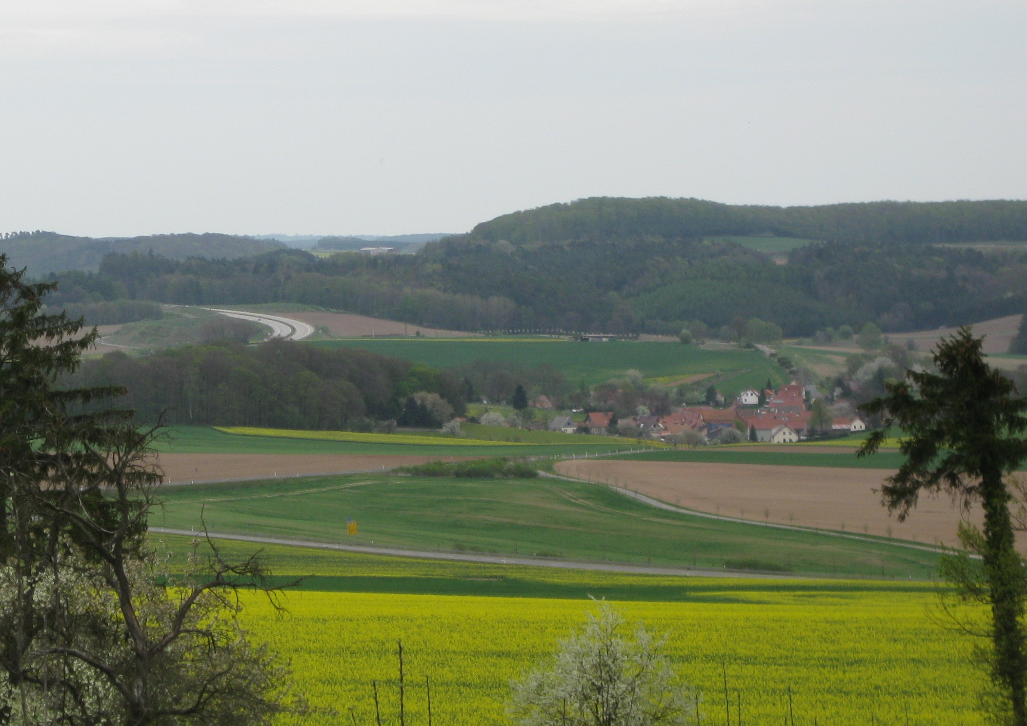 Ansicht aus westlicher Richtung vom Plateu des Schlosses Rusteberg auf Burgwalde